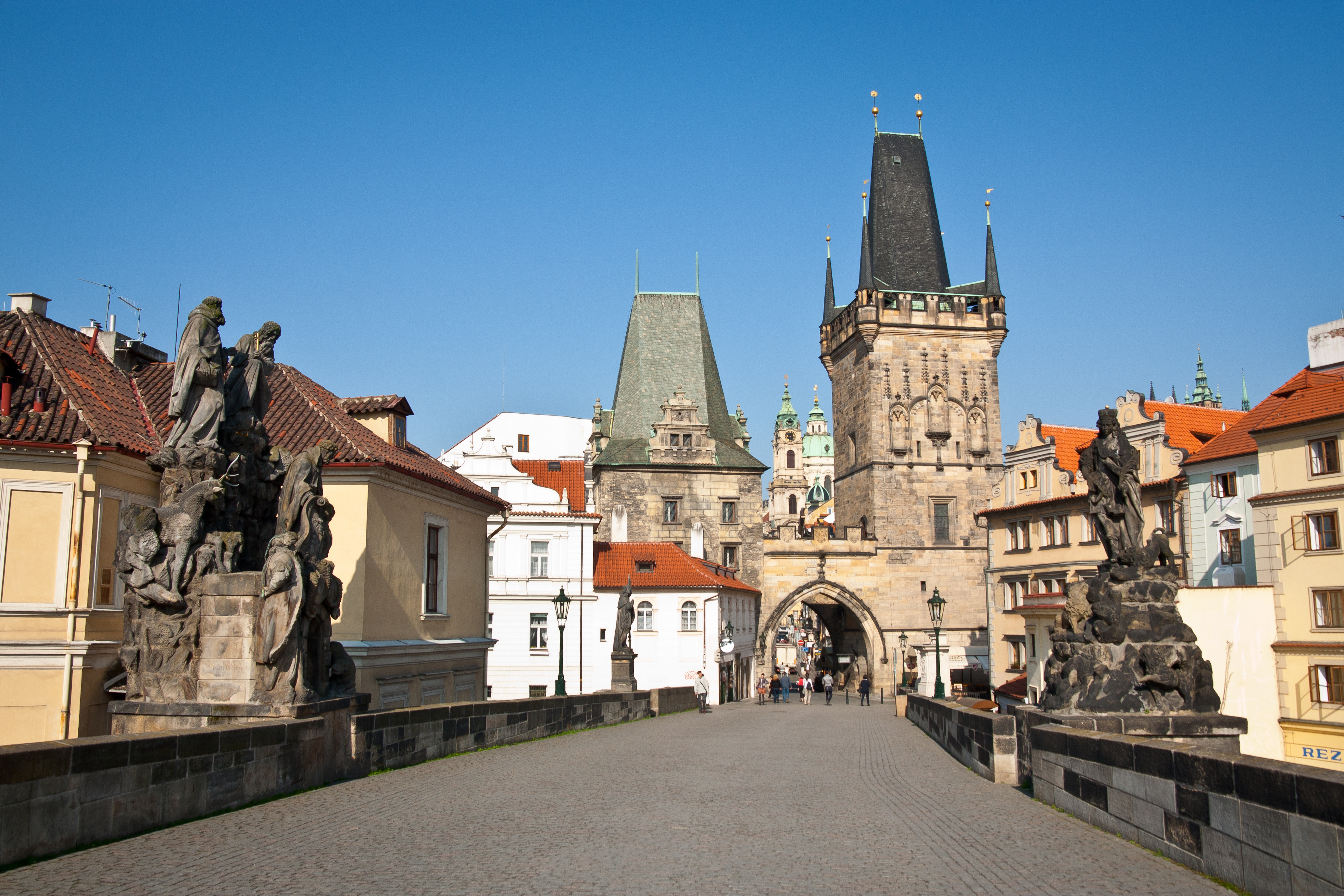 Karlův most, Staré Město a Malá Strana, mezi Křižovnickým náměstím a Mosteckou